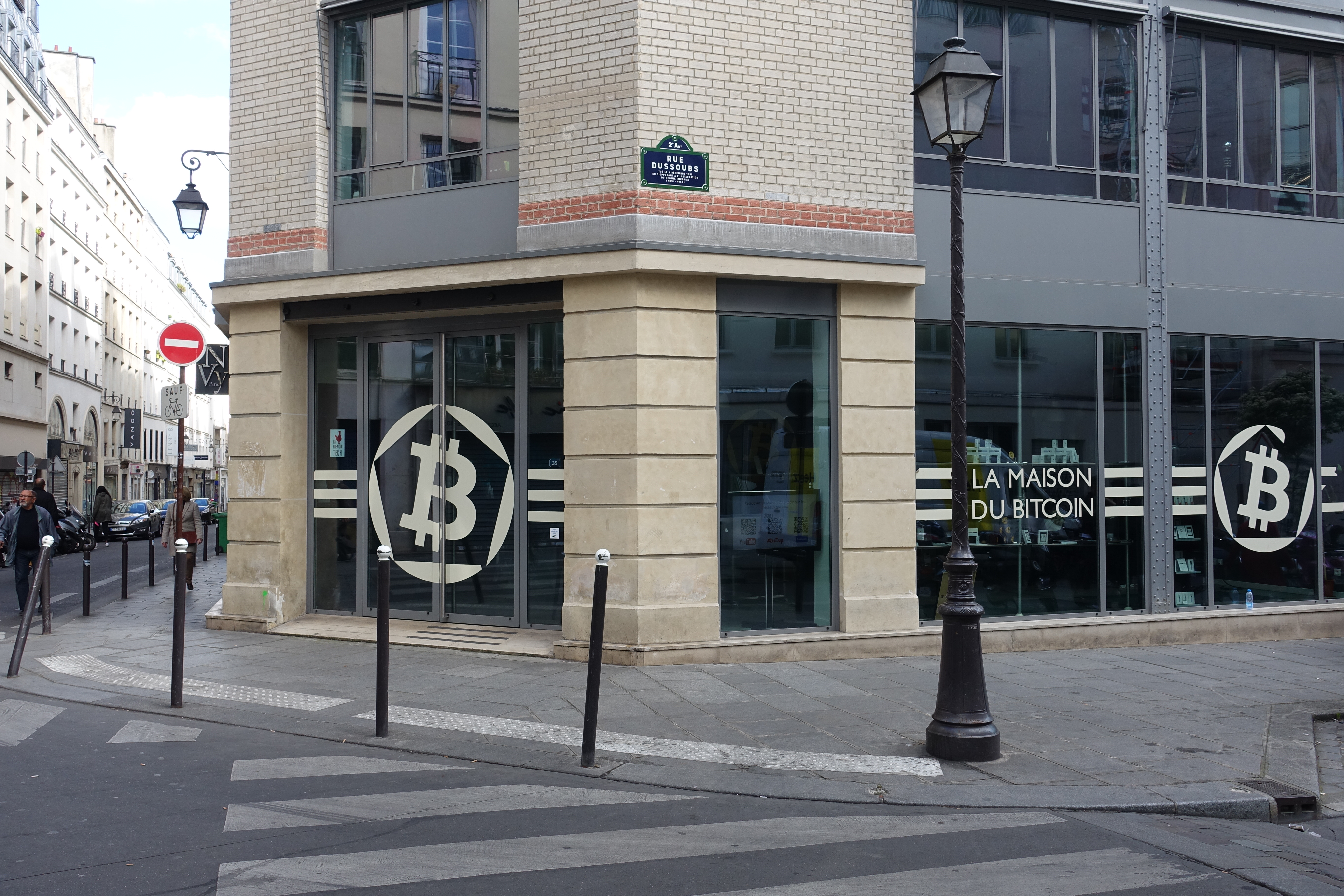 La Maison du Bitcoin @ Paris